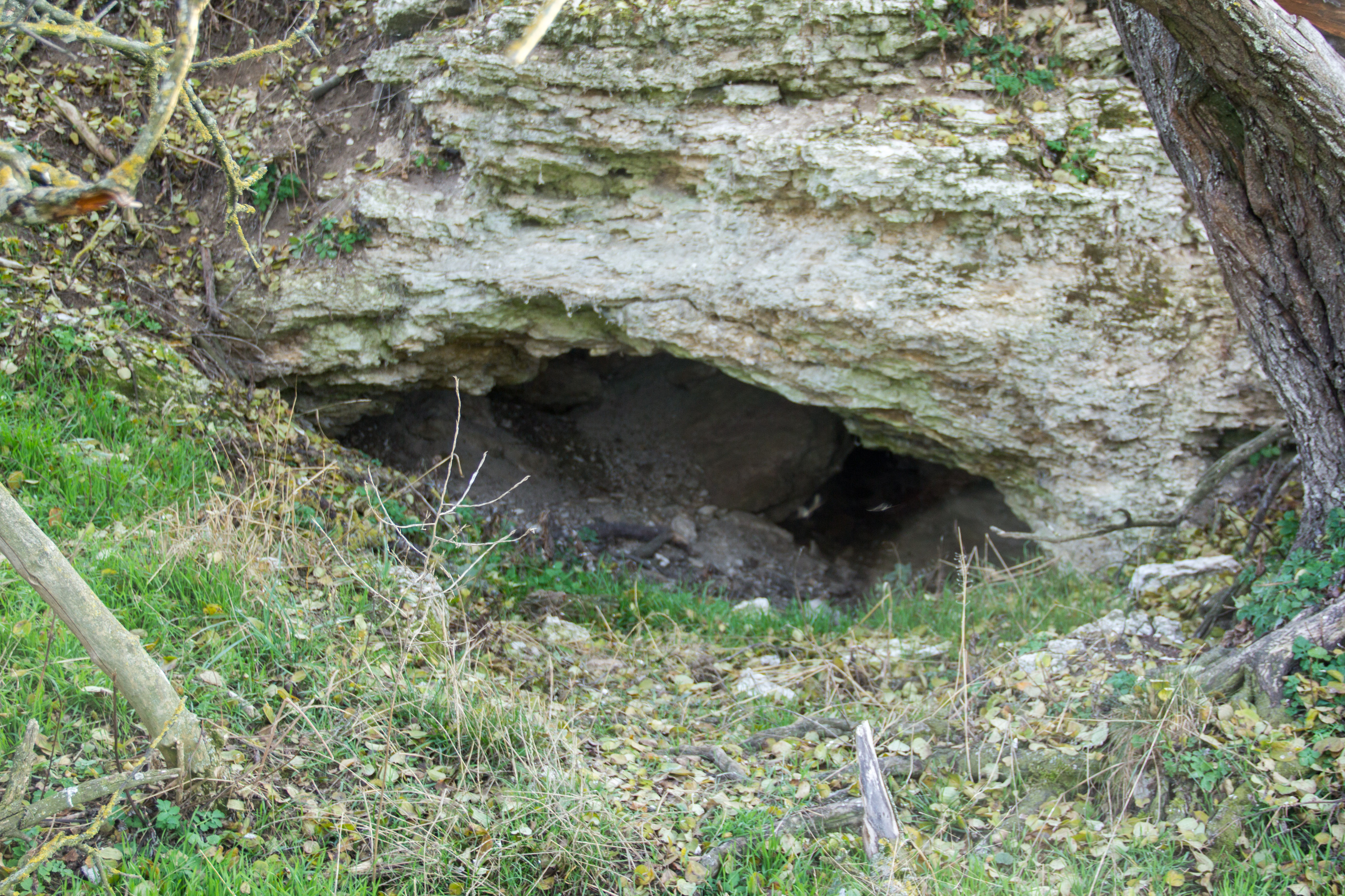 Geotop, Gipshöhle Höllern, Markt Nordheim, Höhleneingang